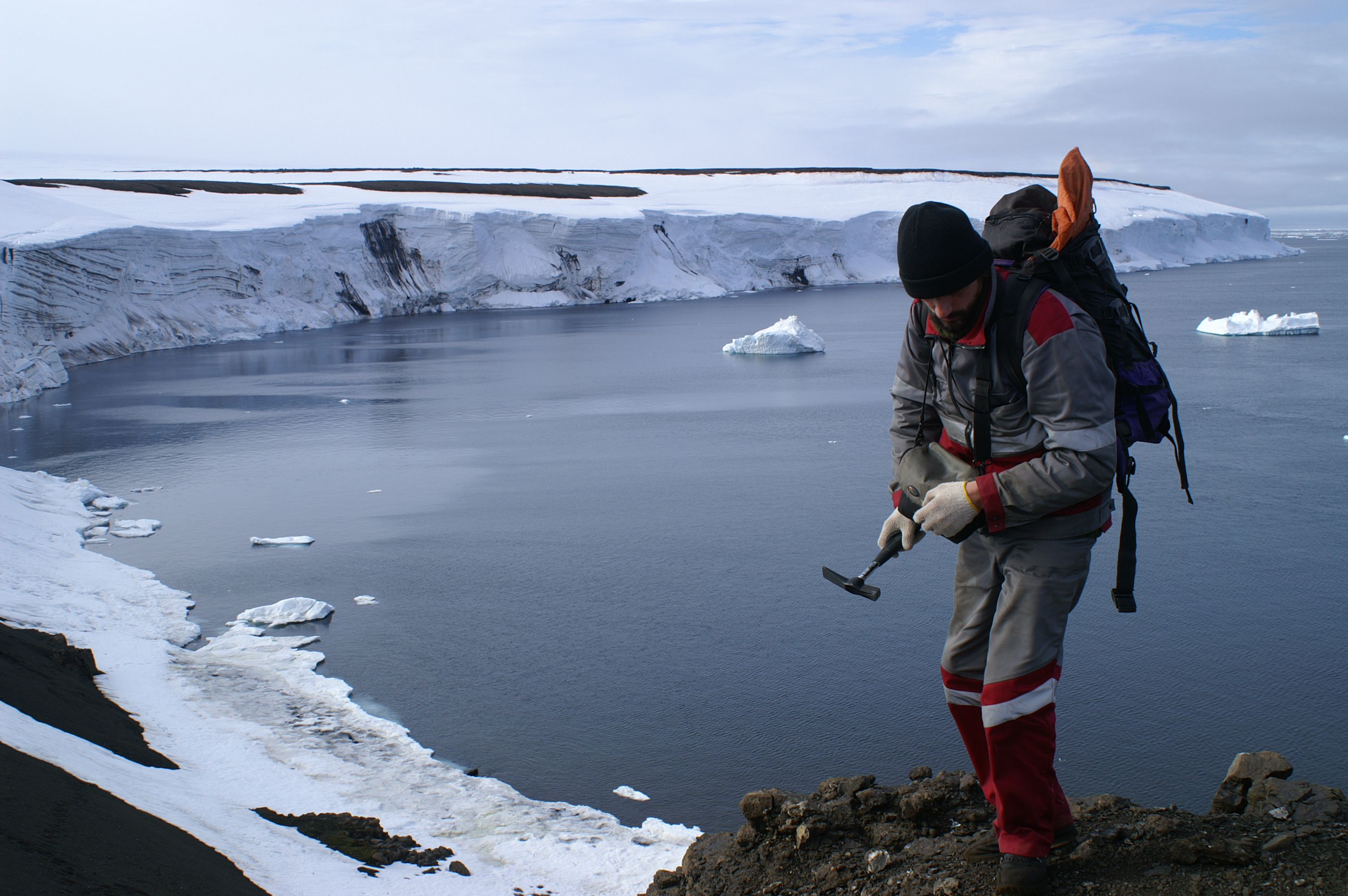 ВНИИОкеангеология: Работы на арктических островах